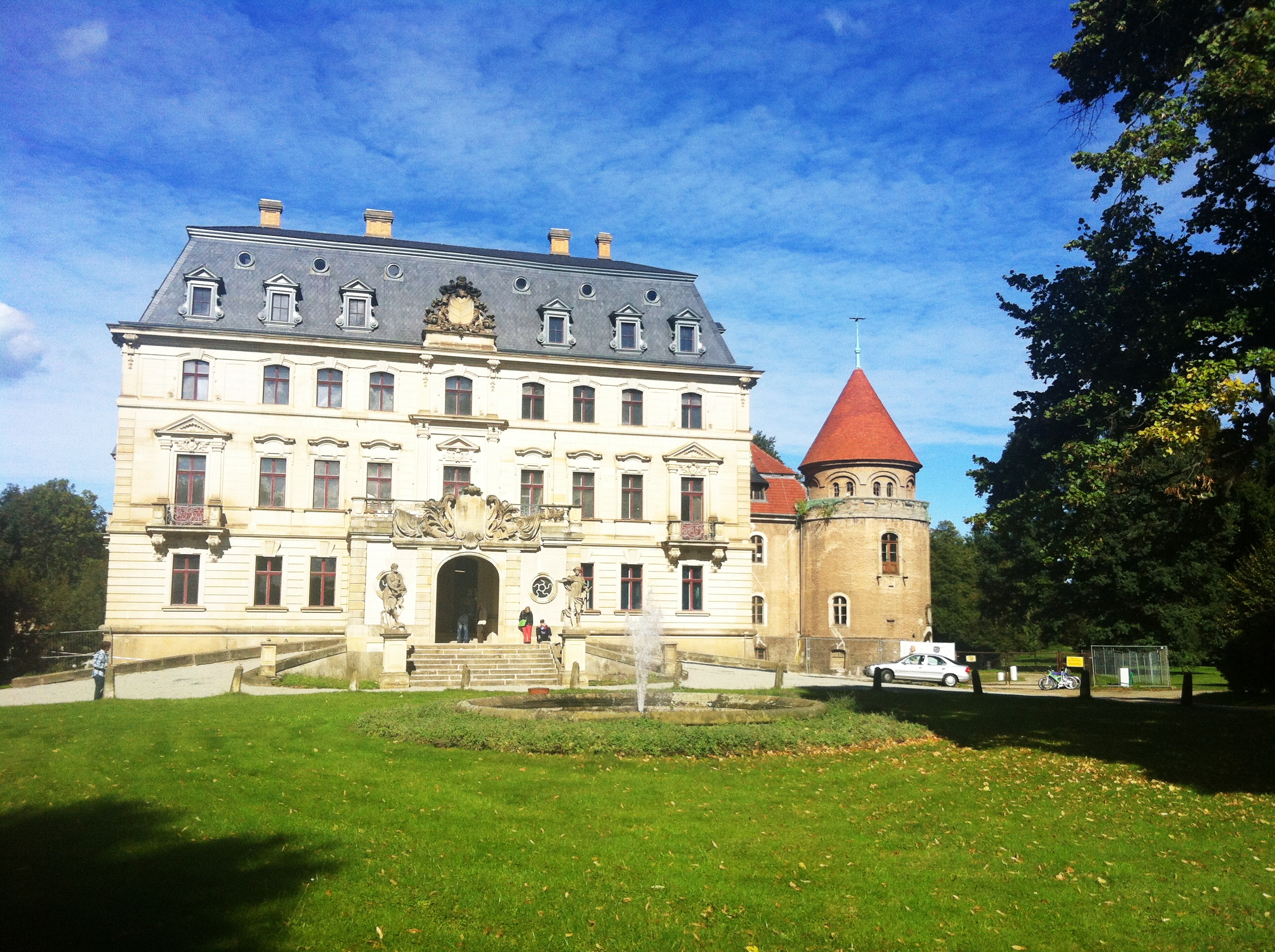 Das Schloss Altdöbern im September 2012. Die Renovierungsarbeiten an Fassade und im Schlossinneren halten an. Der ursprüngliche barocke Teil des Schlosses steht seit neustem für Ausstellungen offen.